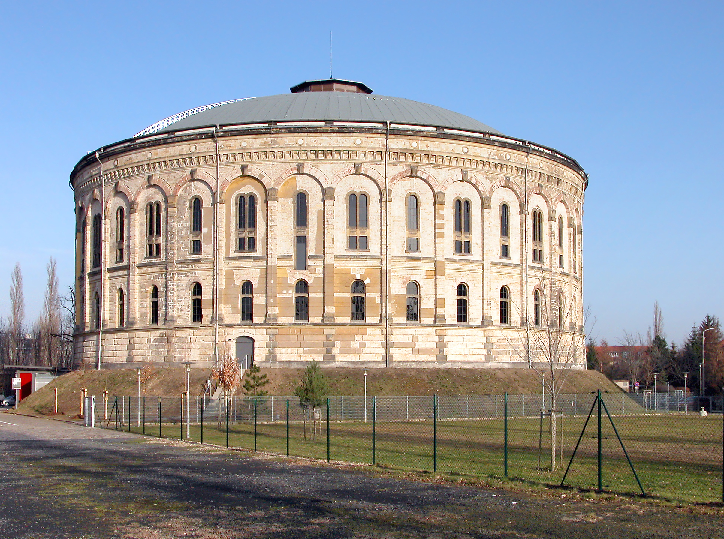 16.12.2006 01237 Dresden-Reick: Blick von Süden zum kleinen Gasometer, Gasanstaltstraße 8 B (GMP: 51.025505,13.788419). Er ist 18 m hoher Rundbau aus dem 19. Jh. vom Architekten Theodor Friedrich. Die Städtische Gasanstalt Reick war von 1881 bis 1973 wichtigster und ab 1923 alleiniger Produzent von Heiz- und Beleuchtungsgas. Die Gasversorgung wurde am 01.03.1881 eröffnet. Am 02.05.1973 wurde der Gasbetrieb eingestellt. Seit dem 09.12.2006 zeigt der Künstler Yadegar Asisi hier im Gasometer, den man nun 'Panometer' nennt, seine Panoramabilder. [DSCN20244.TIF]20061216020DR.JPG(c)Blobelt